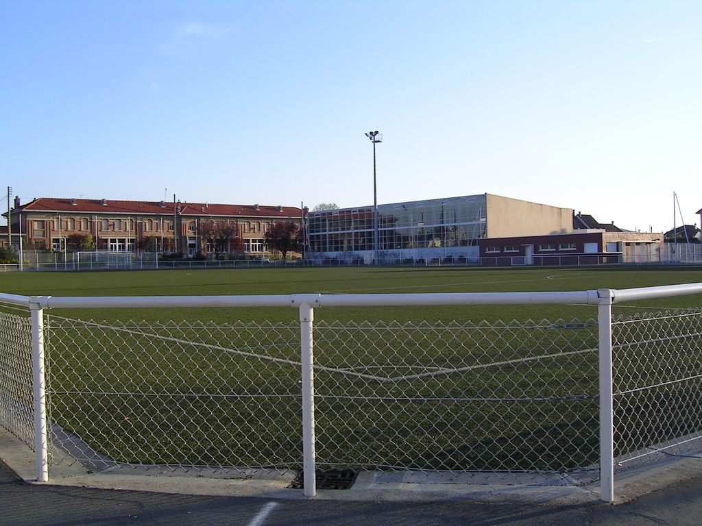 Stade Marcel Cerdan, quartier du Vert-Galant Photo personnelle (own work) de Marianna